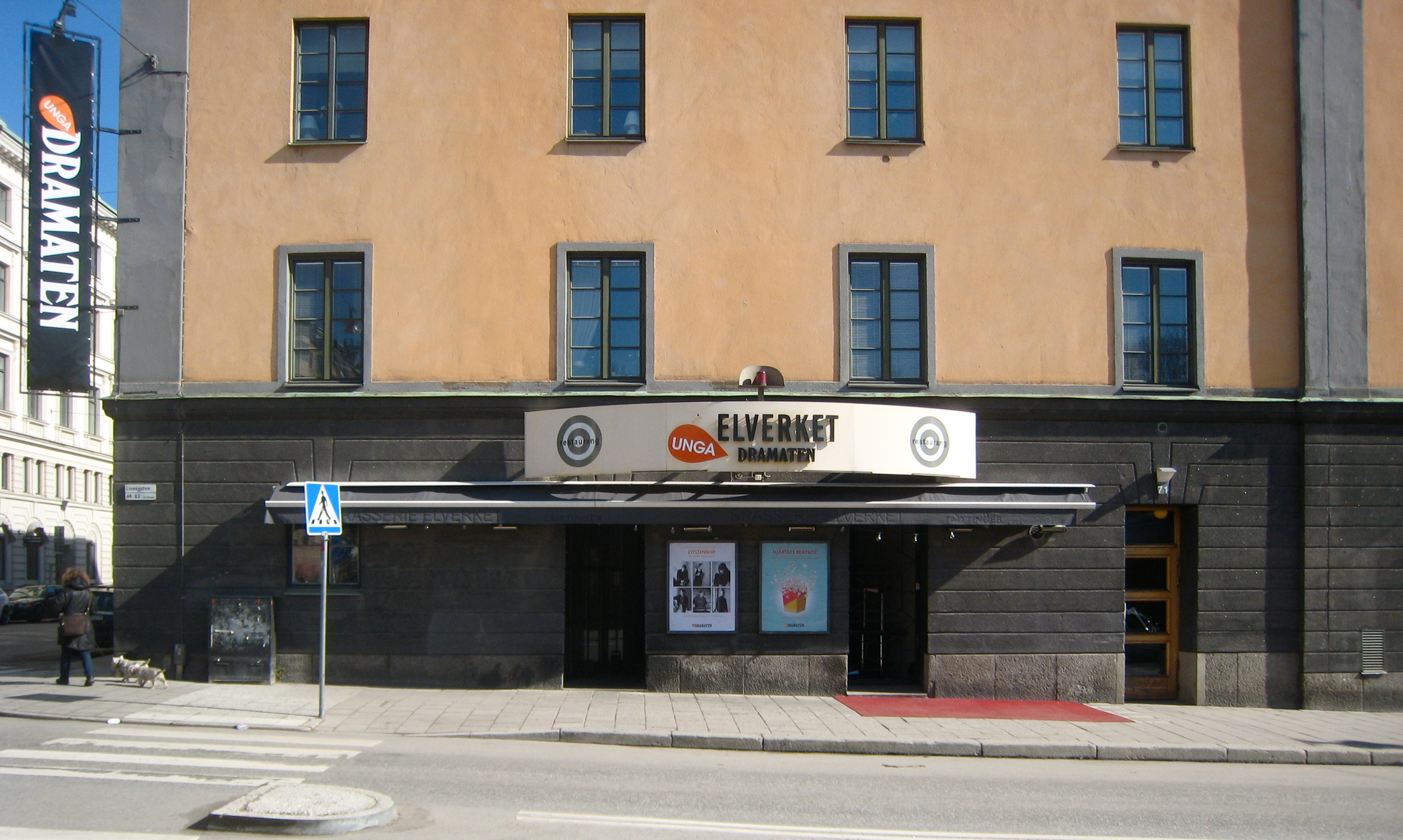 Elverket